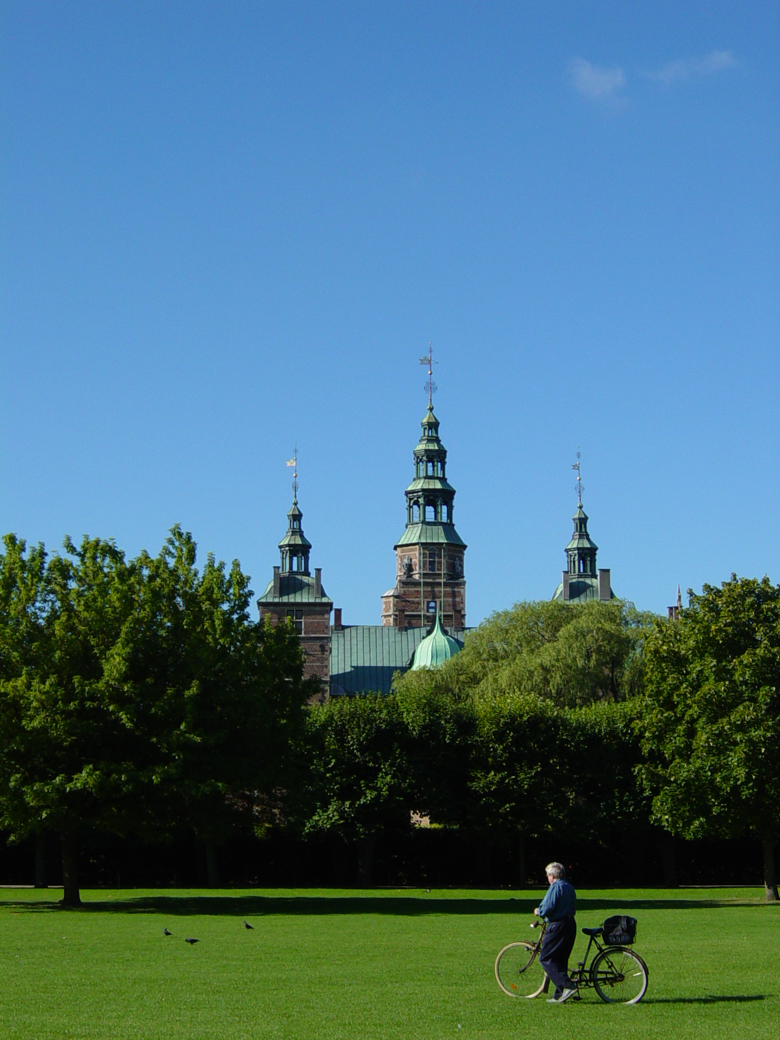 Billede af Rosenborg Slot og Kongens Have